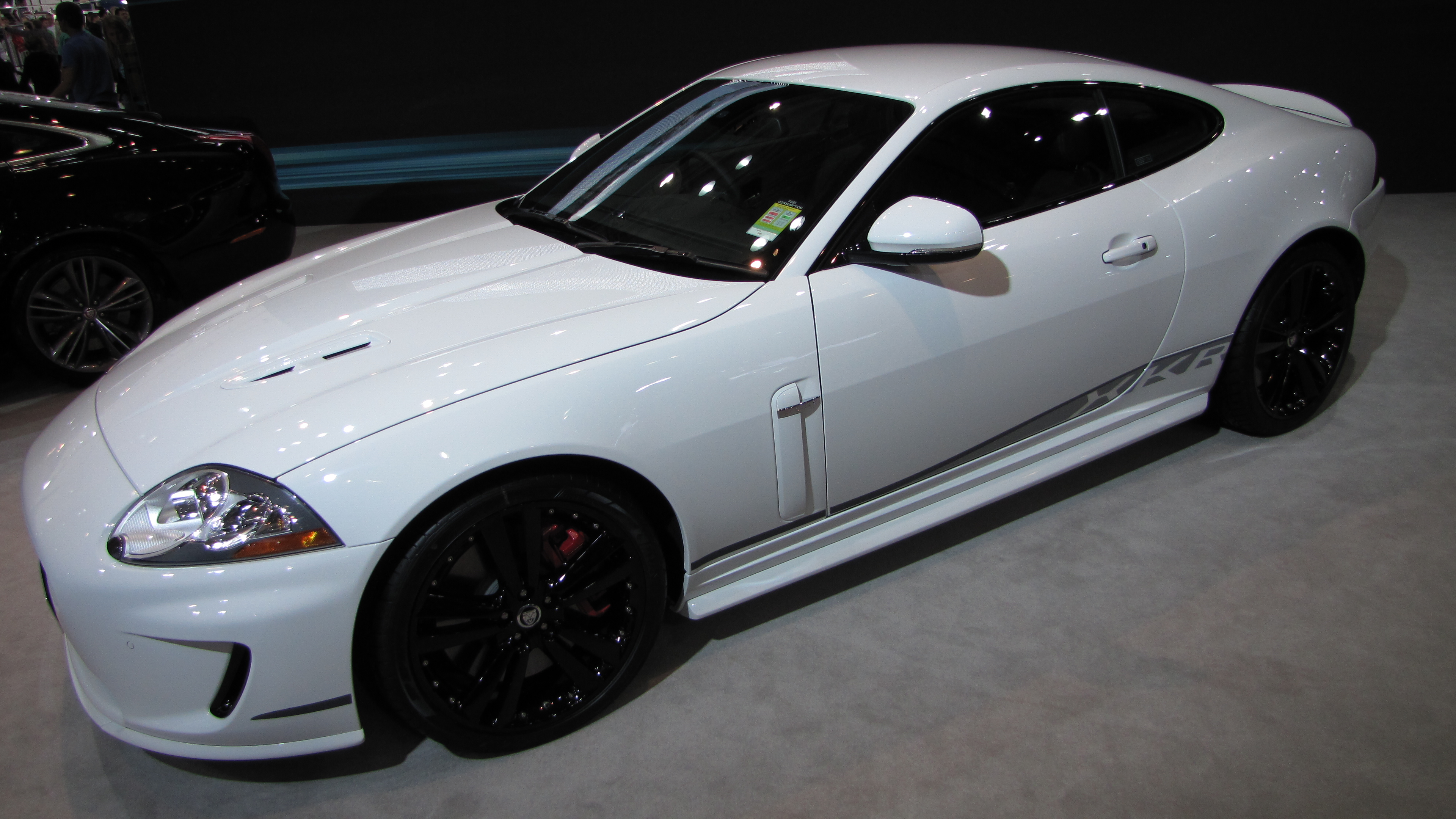 20101016_SX1IS_299